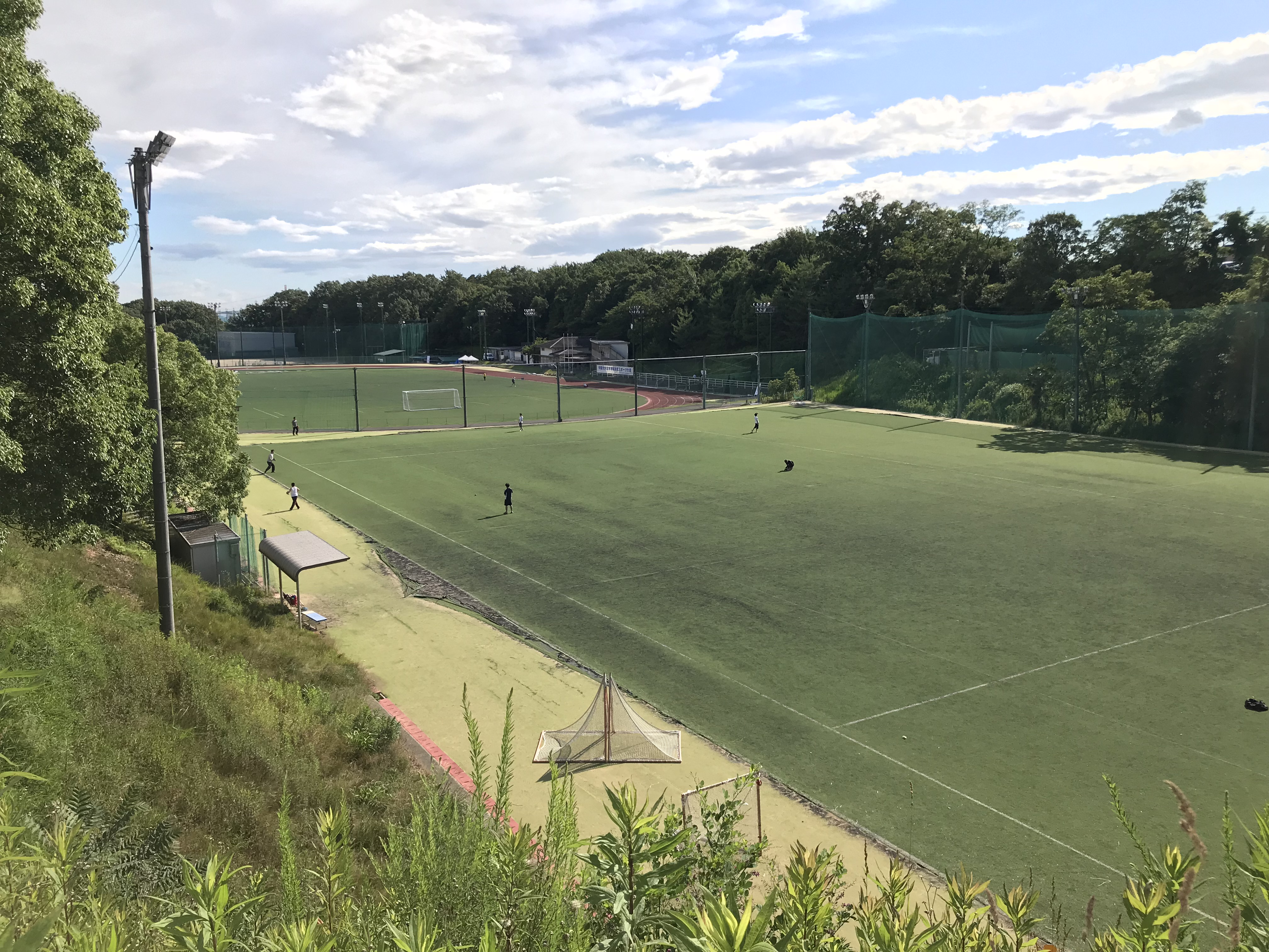 中部大学のグラウンドになります。